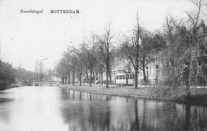 De Noordsingel in Rotterdam. Foto van prentbriefkaart, fotograaf onbekend.